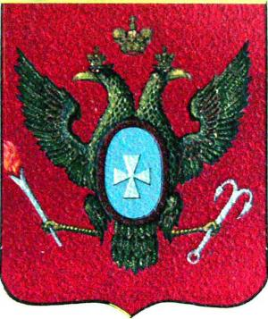 София (Санкт-Петербург), герб